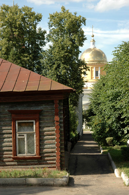 Кашира. Купол Успенского собора. Деревянный дом на переднем плане (Советская, 44) и каменный дом позади него - Каширский краеведческий музей.